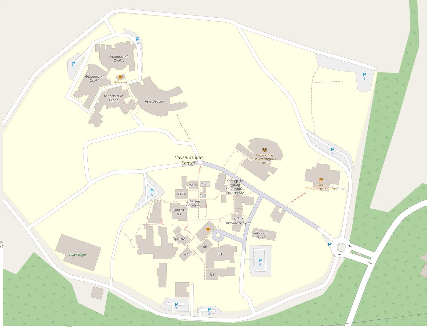 Χάρτης της Πανεπιστημιούπολης Ρεθύμνου